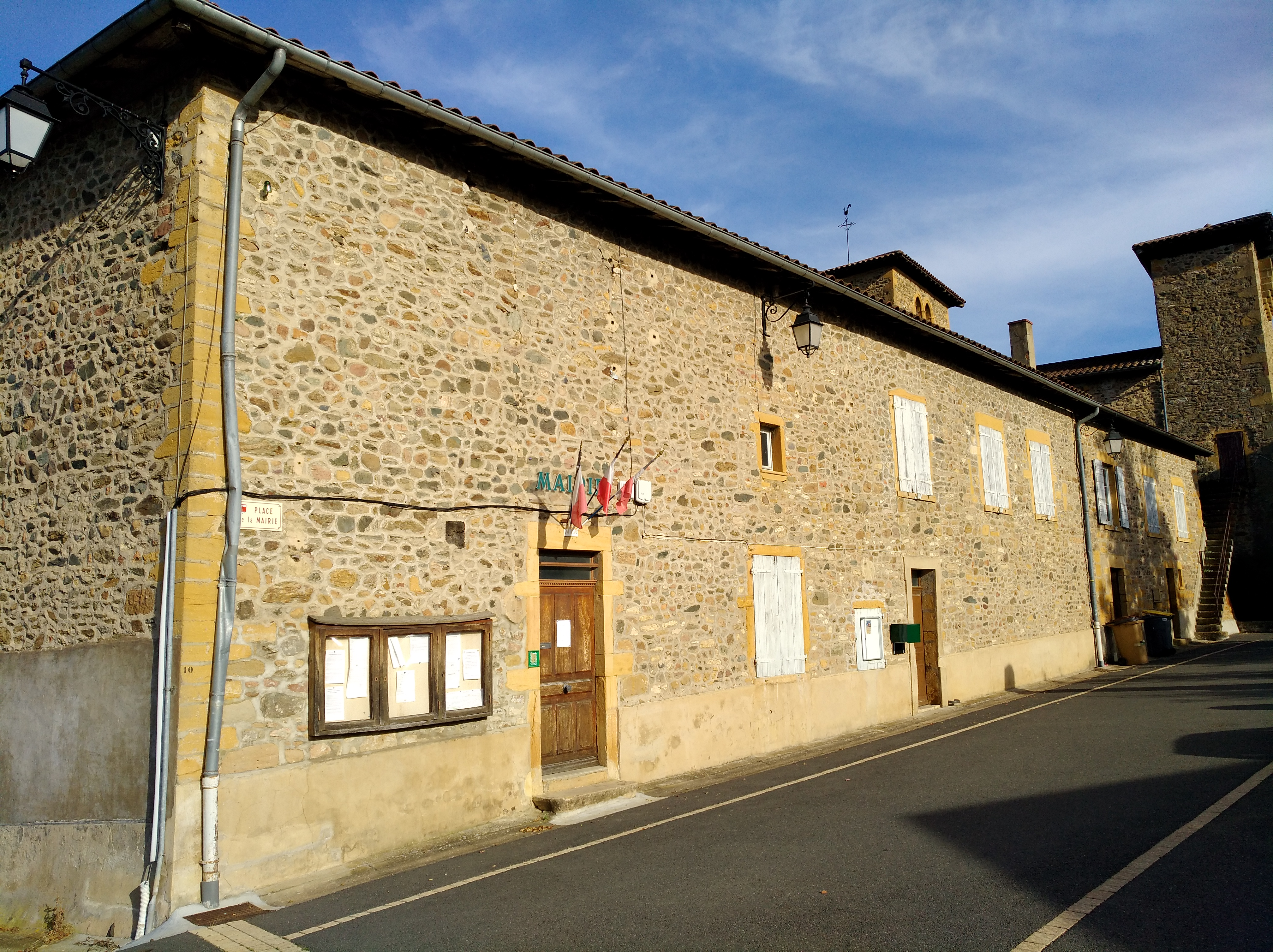 Mairie du Breuil (Rhône, France).